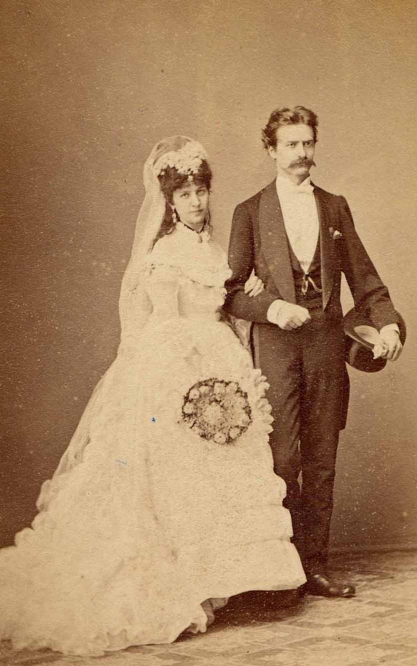 Saxlehner Emma magyar opera-énekesnő és Kvassay Ede író esküvői képe. Hungarian Theatre Museum and Institute LocationBudapestCoordinates47° 29′ 51.75″ N, 19° 01′ 47.32″ E Established1952Web pageszinhaziintezet.hu Authority control : Q1226166 VIAF: 152589477 ISNI: 0000 0001 0945 5202 BNF: 123022856 NKC: mzk2010513258 institution QS:P195,Q1226166